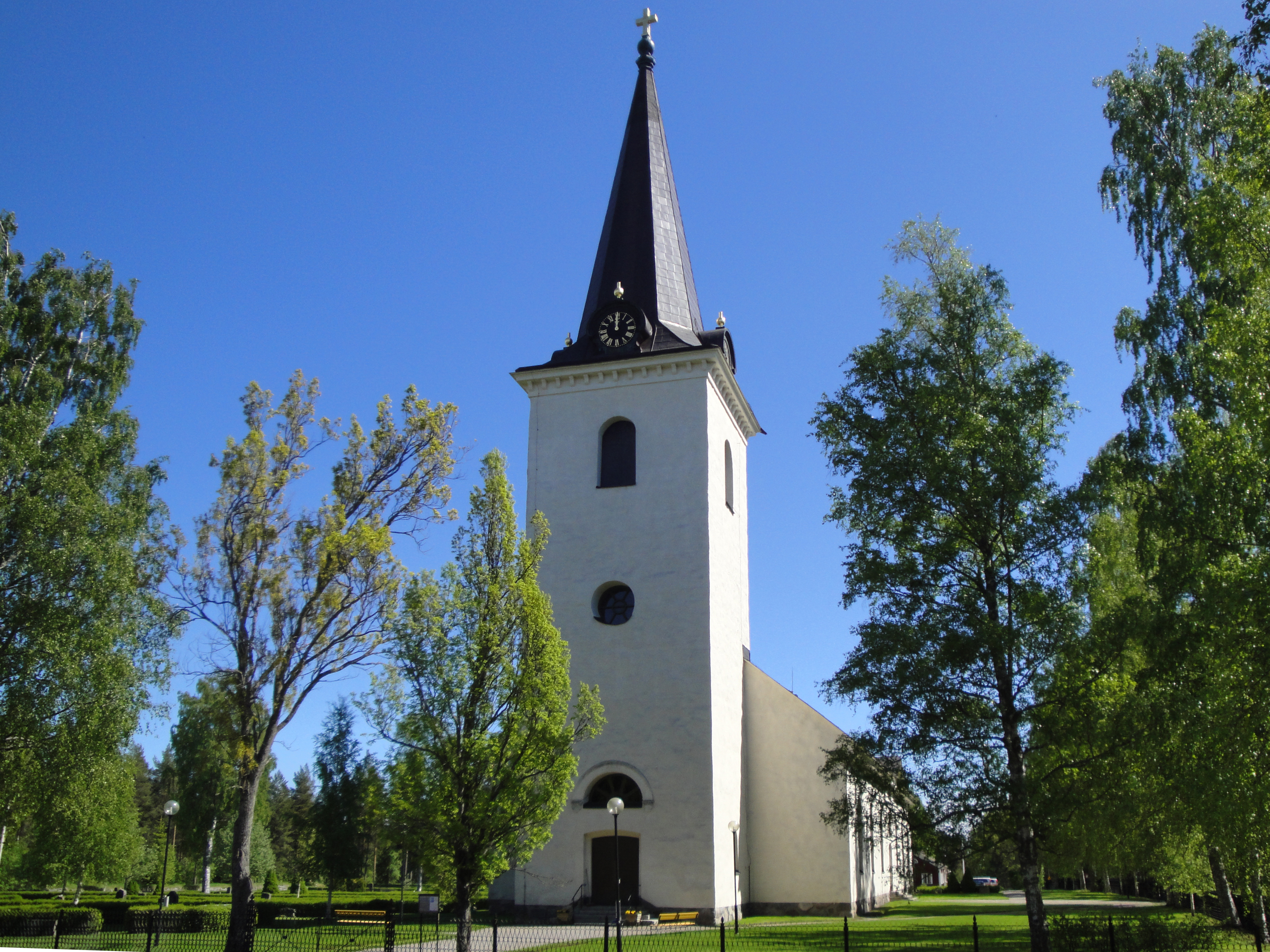 Mo kyrka, Uppsala stift, Söderhamns kommun.